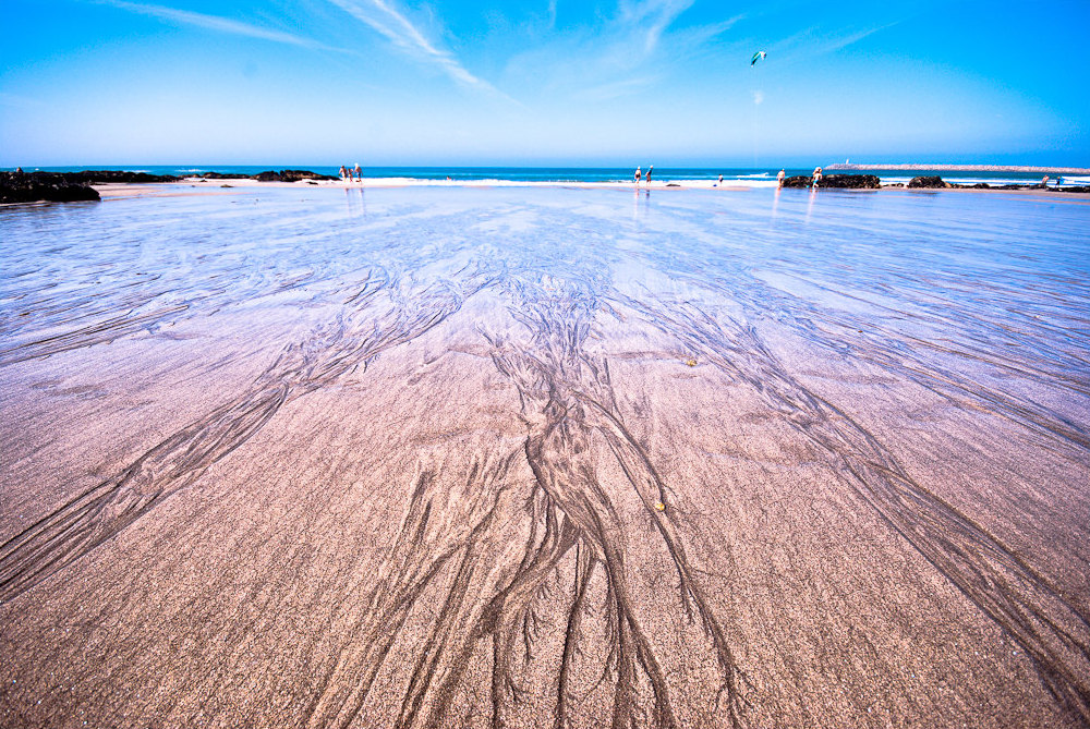 Portugal